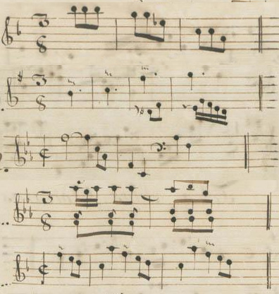 Table du volume IV des manuscrits de Parme (montage des incipit des sonates 12 et 21 à 24, K. 202 à 205).